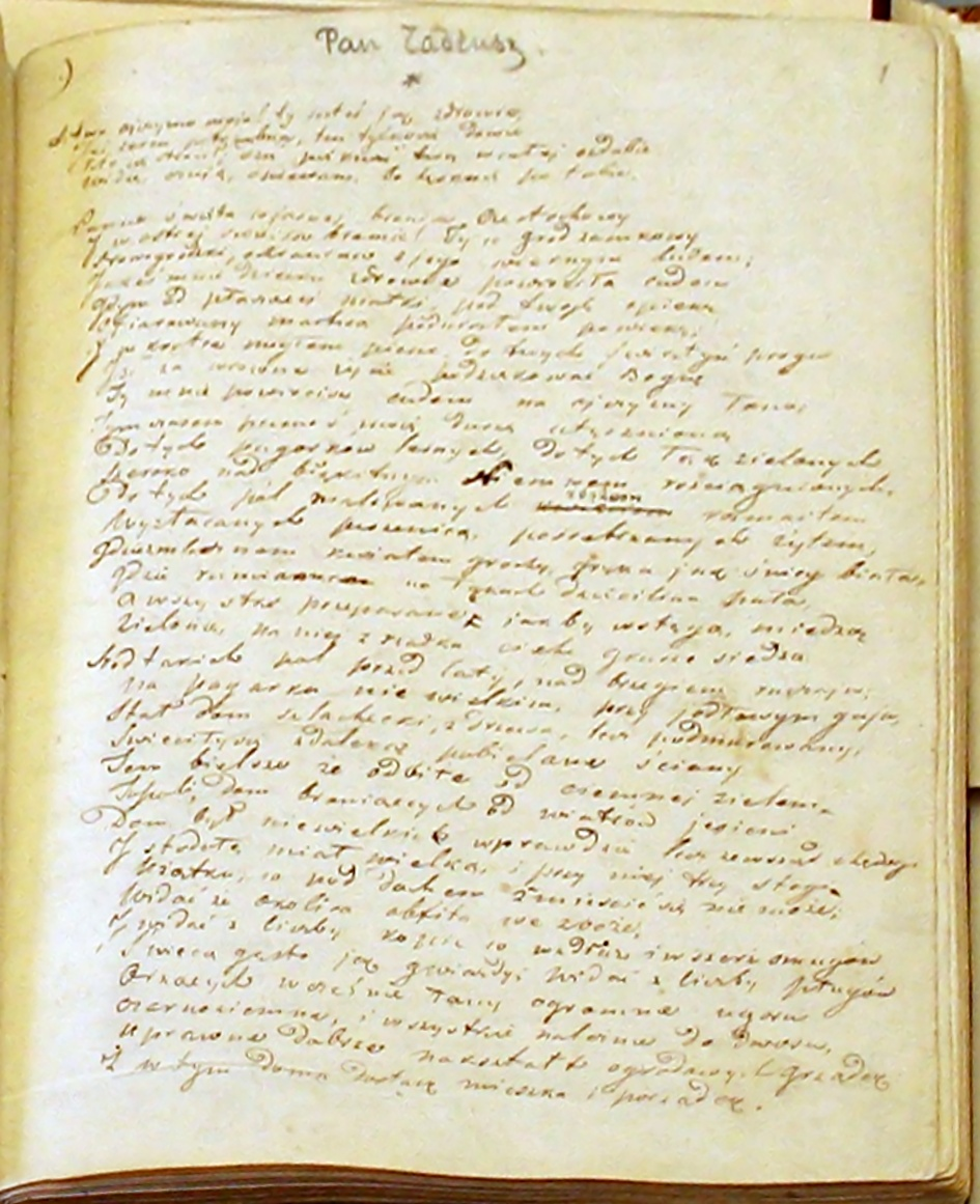 Rękopis Pana Tadeusza w zbiorach Zakładu Narodowego im. Ossolińskich we Wrocławiu.